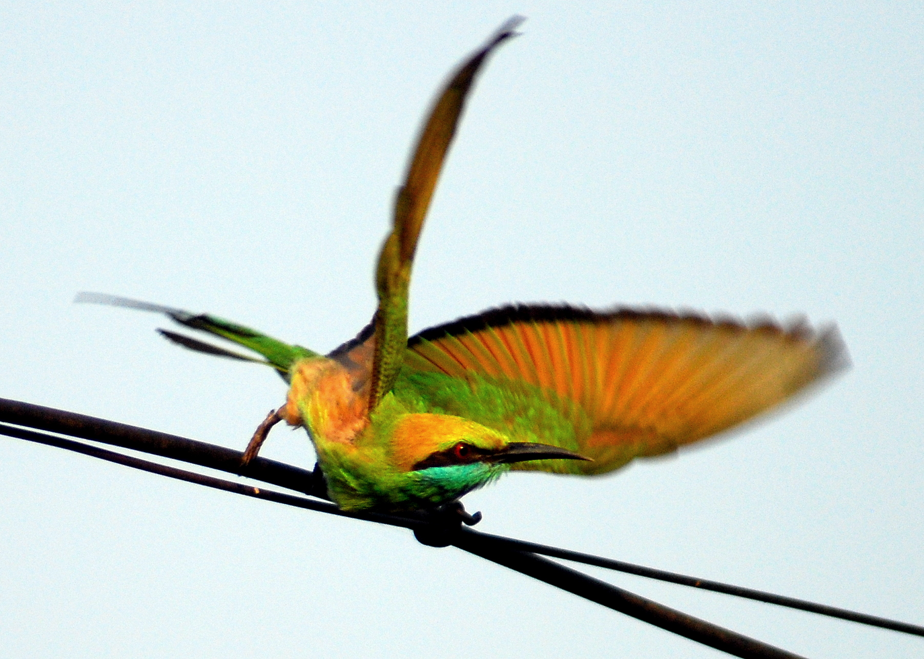 Little Green Bee-eater Merops orientalis, Mavoor, Kozhikode district, Kerala, India